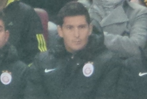 Guillermo Burdisso